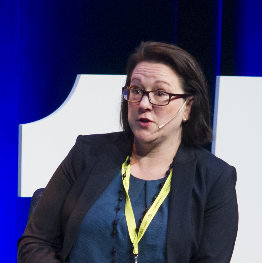 Nordiske Mediedager 2015